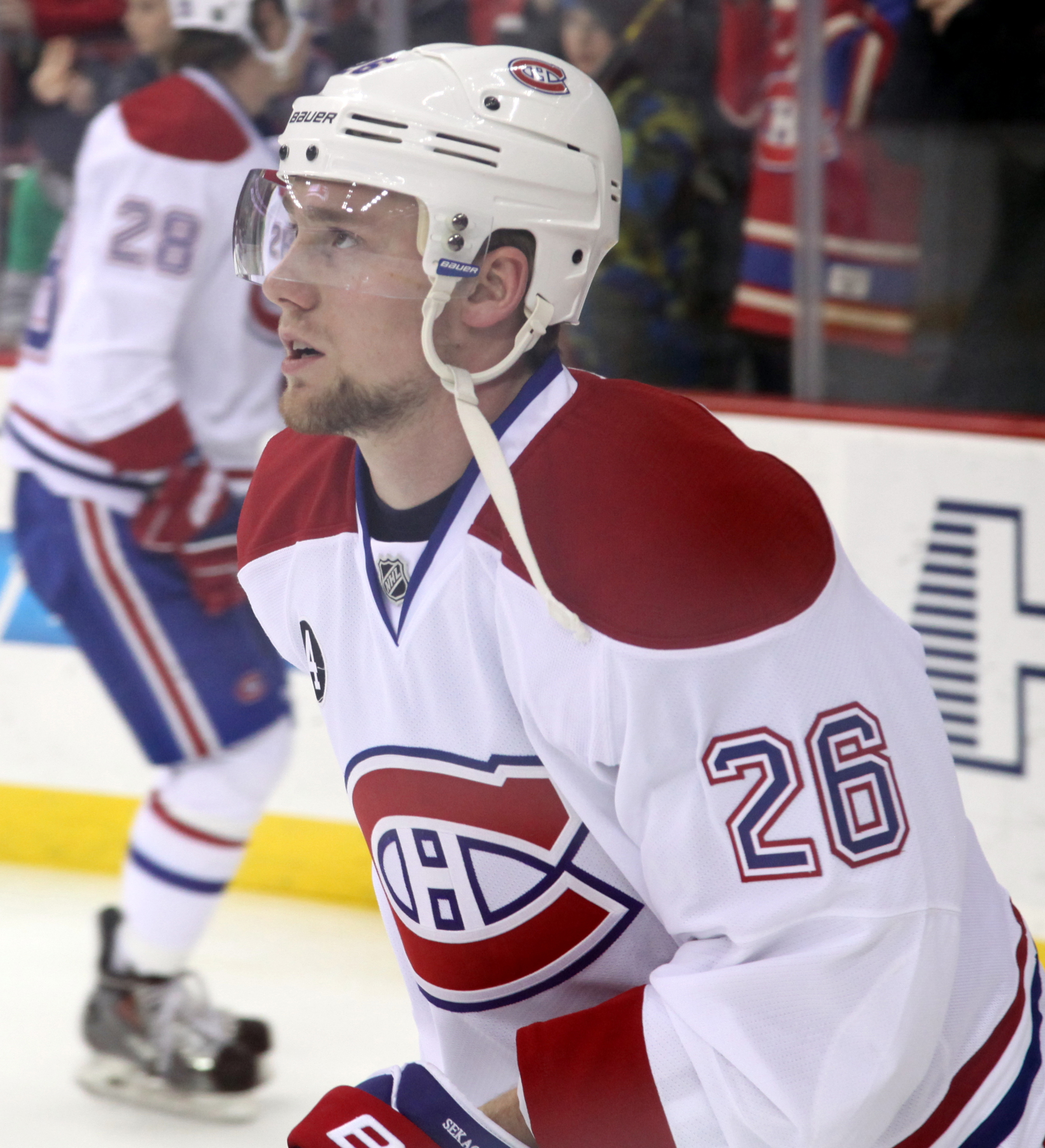 Jiri Sekac in January 2015.